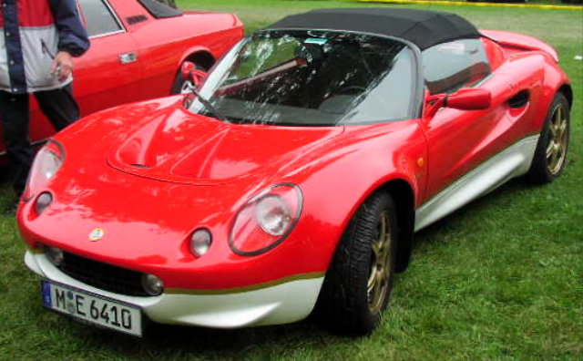 Lotus Elise